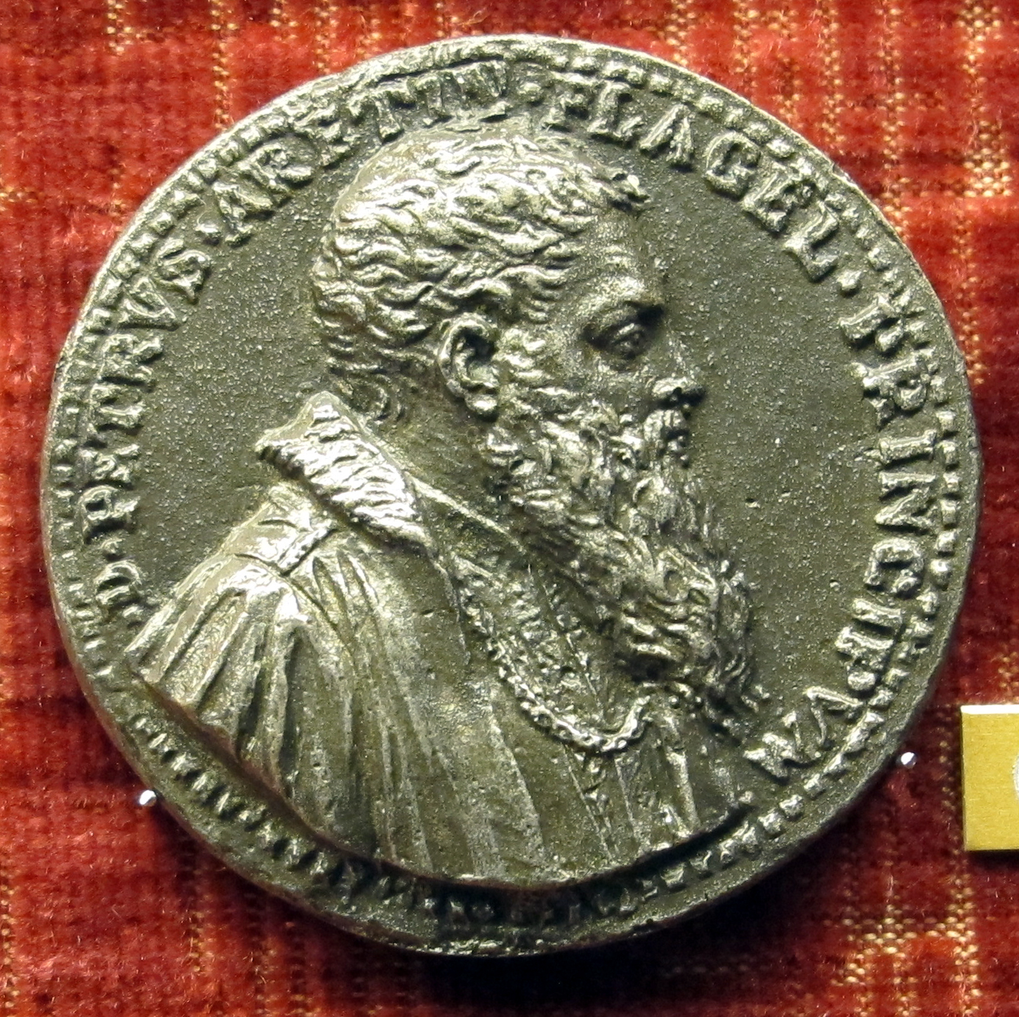 medaglia di autore anonimo